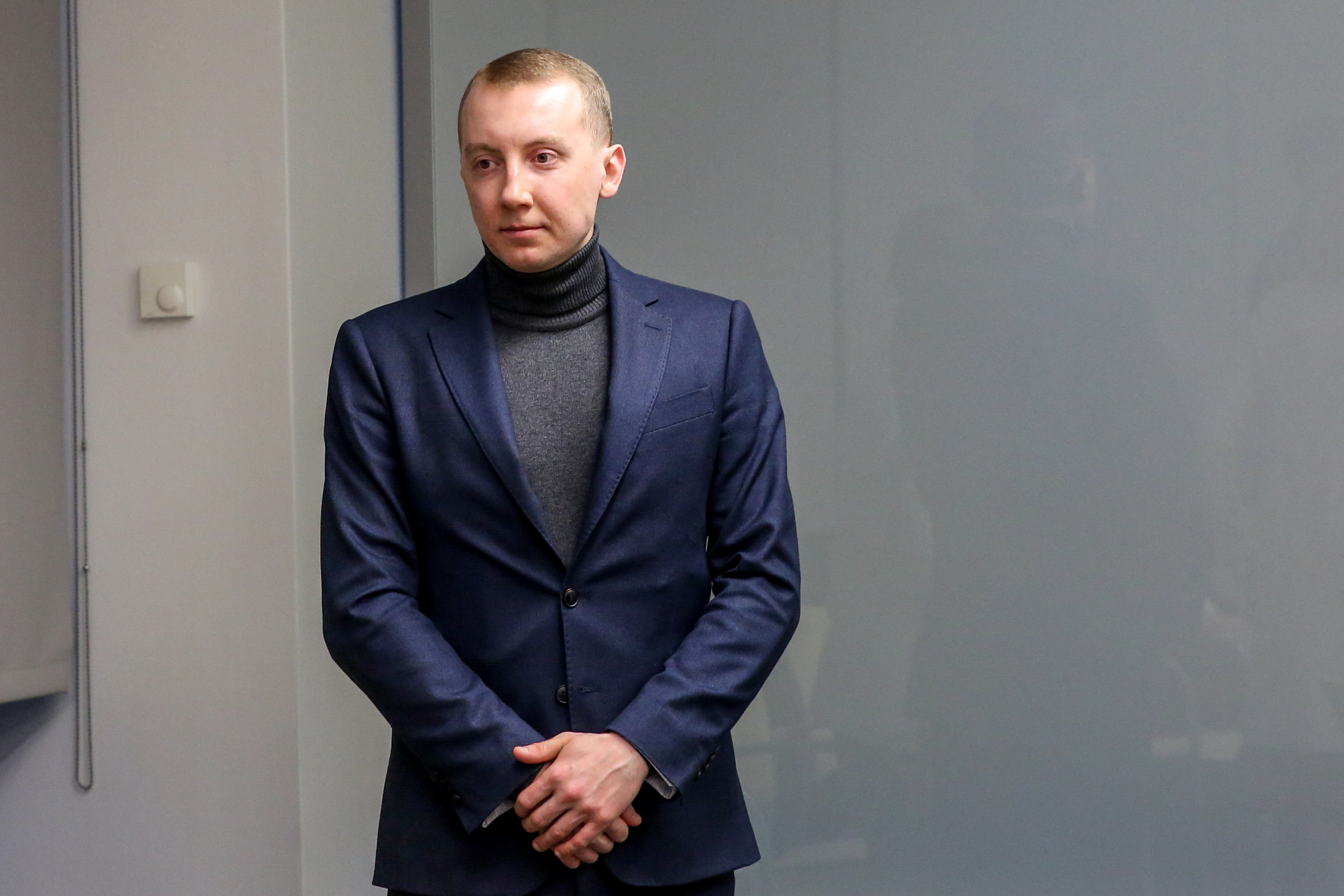 Фото Станислава Асеева